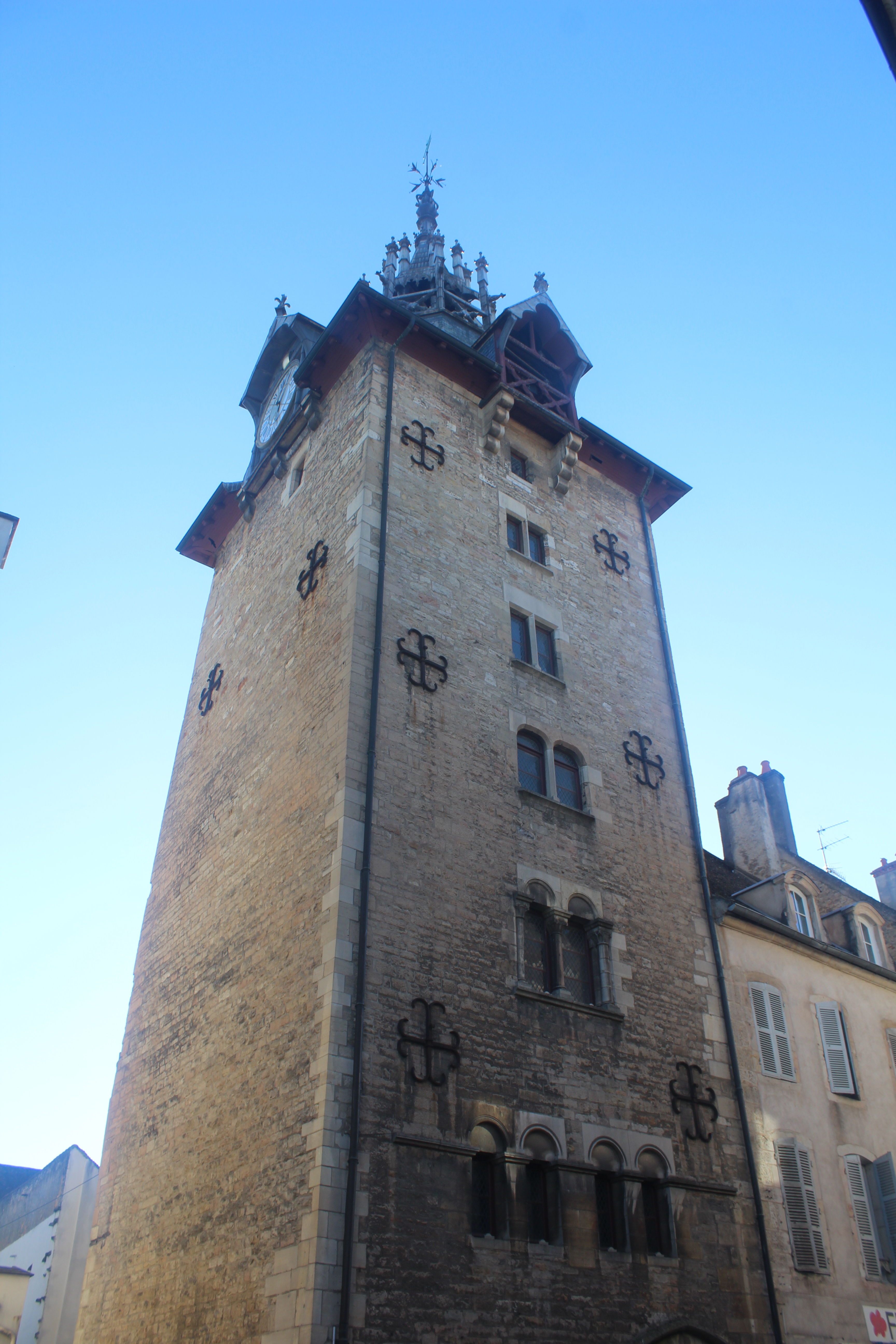 Tour de l'Horloge à Beaune.